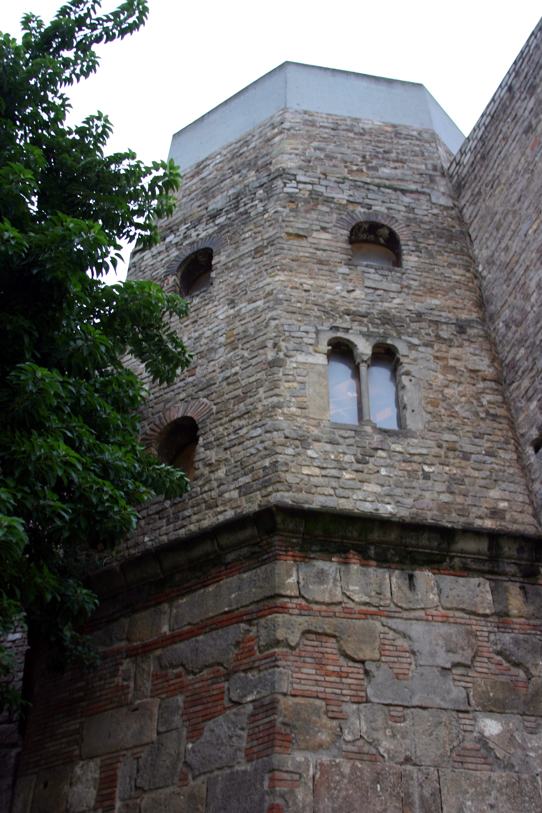 Pia Almoina